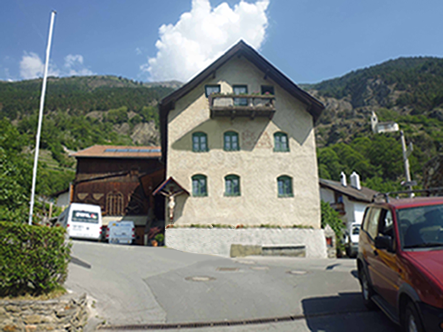 Herrenbrunn in Kortsch von Süden